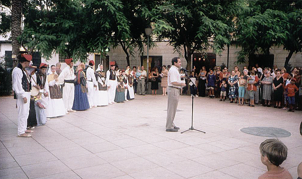 Inauguración de la Plaça del Parc de Ibiza, tras la instalación de la obra MANS D'EIVISSA de Fréderic Bérthelot